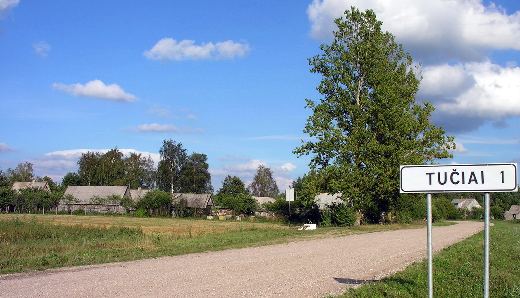 Tučiai, Mažeikių rajonas, Viekšnių seniūnija Foto: Algirdas, 2006 m. rugpjūčio 20 d., Lietuva